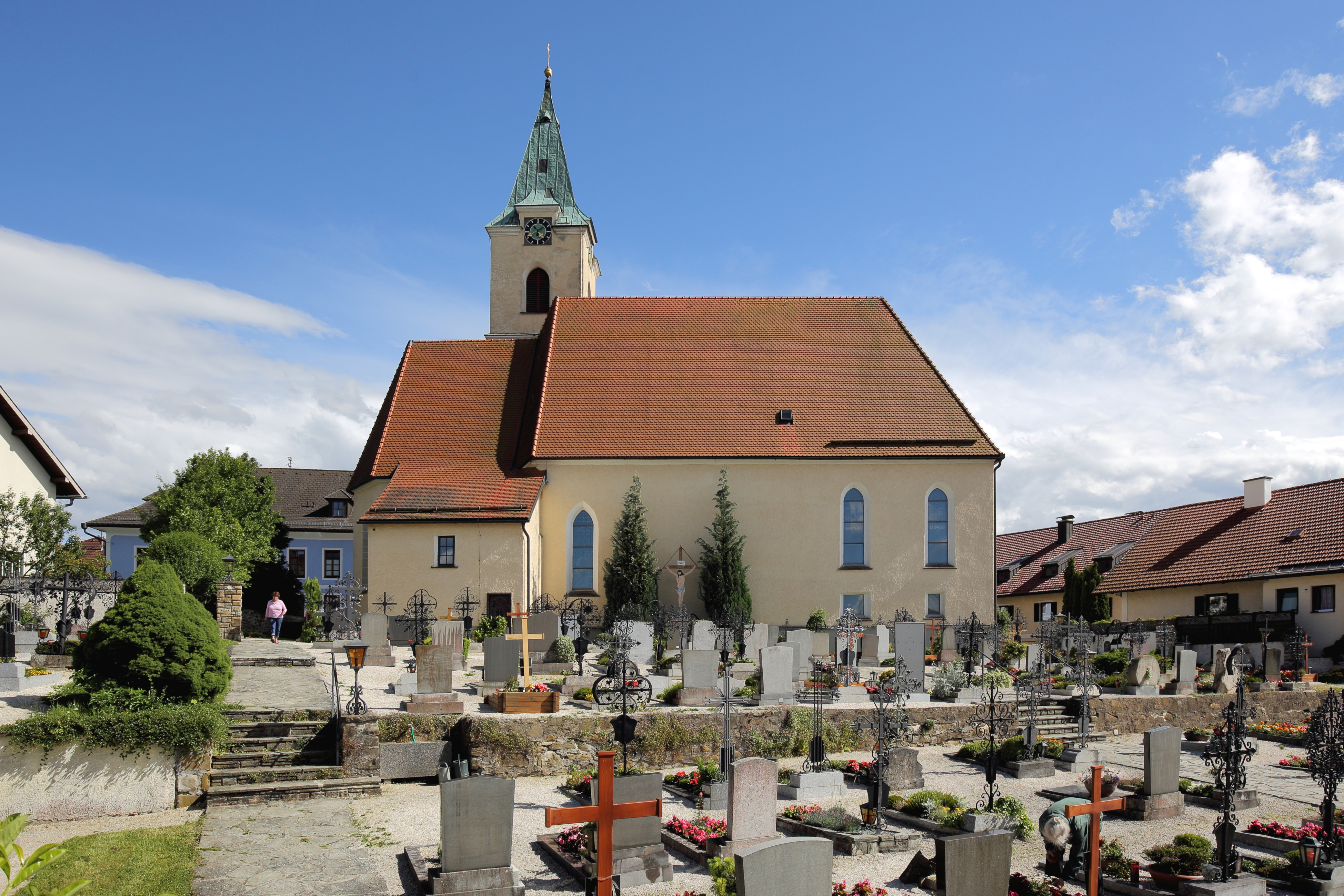 Nordansicht der röm.-kath. Pfarrkirche hl. Valentin in der oberösterreichischen Gemeinde Weyregg am Attersee.Die spätgotische Kirche wurde in der zweiten Hälfte des 15. Jahrhunderts errichtet. 1931/1932 erfolgte eine Erweiterung Richtung Westen um rund acht Meter und im Anschluss erhielt die Kirche im südlichen Chorwinkel einen Kirchturm, nachdem sie bis dorthin nur einen Dachreiter hatte.